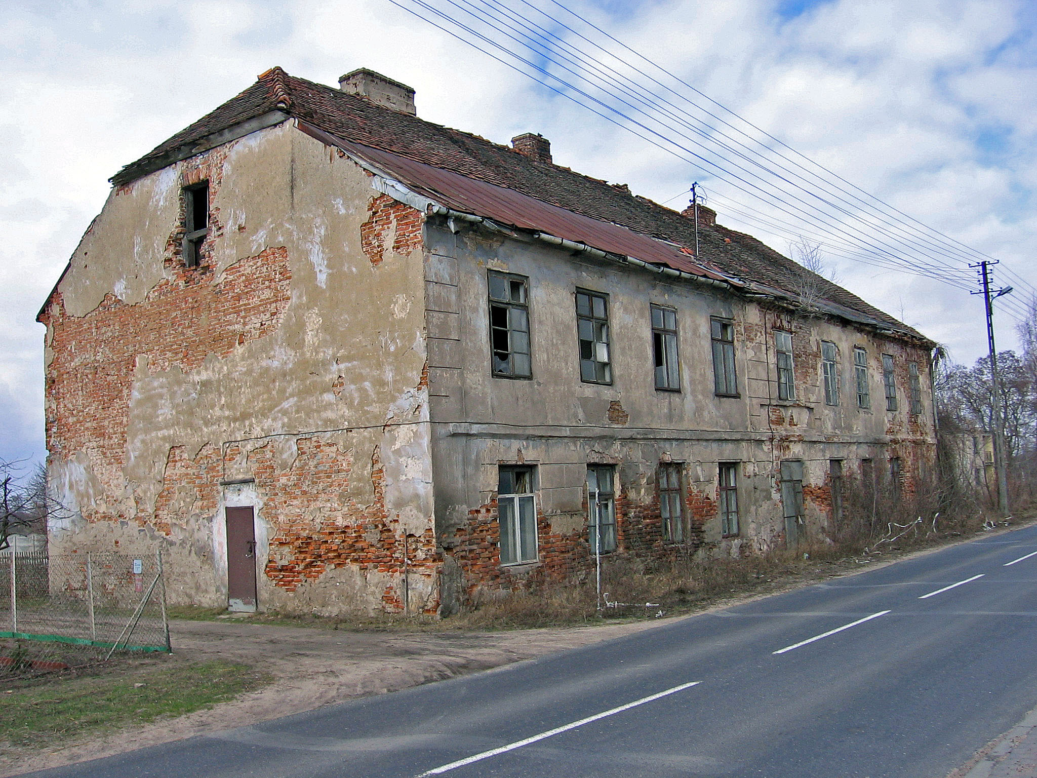 magazyn soli, a w czasach napoleońskich lazaret Author: Siedlaro ¿? Date: April 2006